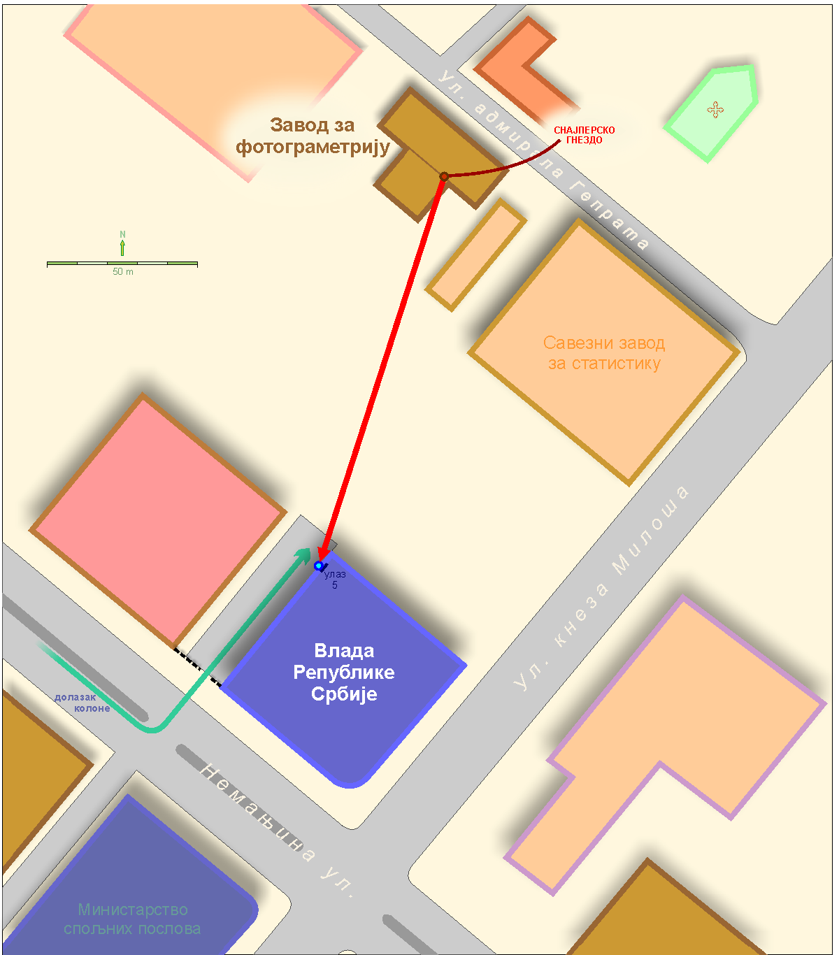 Mapa uspelog atentata na Zorana Đinđića. Đinđić je stigao do zgrade Vlade Srbije u vozilu pod pratnjom, a upucan je dok je ulazio u zgradu. Njegov položaj označen je plavom tačkom, a položaj atentatora crvenom.